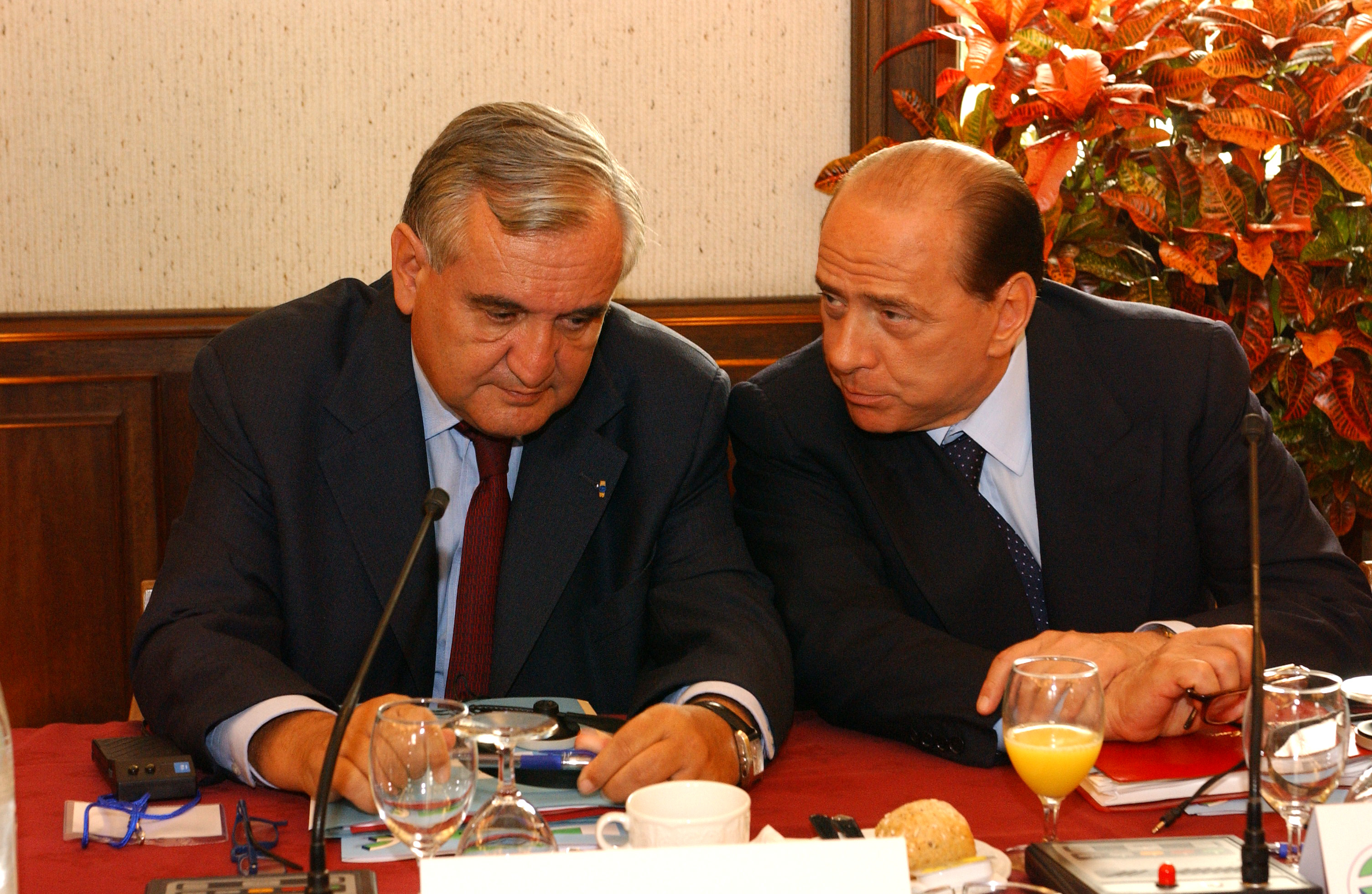 EPP Summit Meise 16-17 June 2004